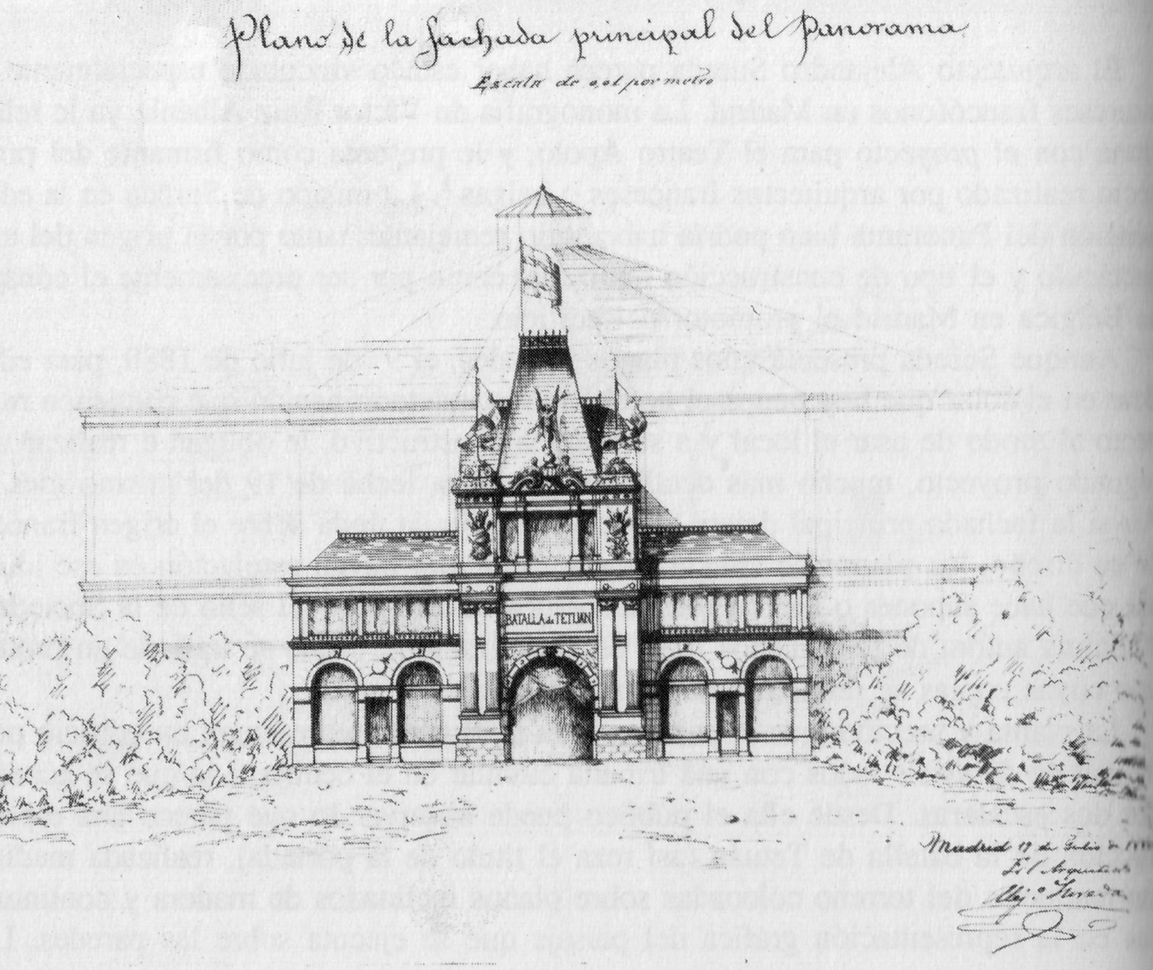 Proyecto de construcción del Teatro Panorama de Madrid. Museo Municipal de Madrid.